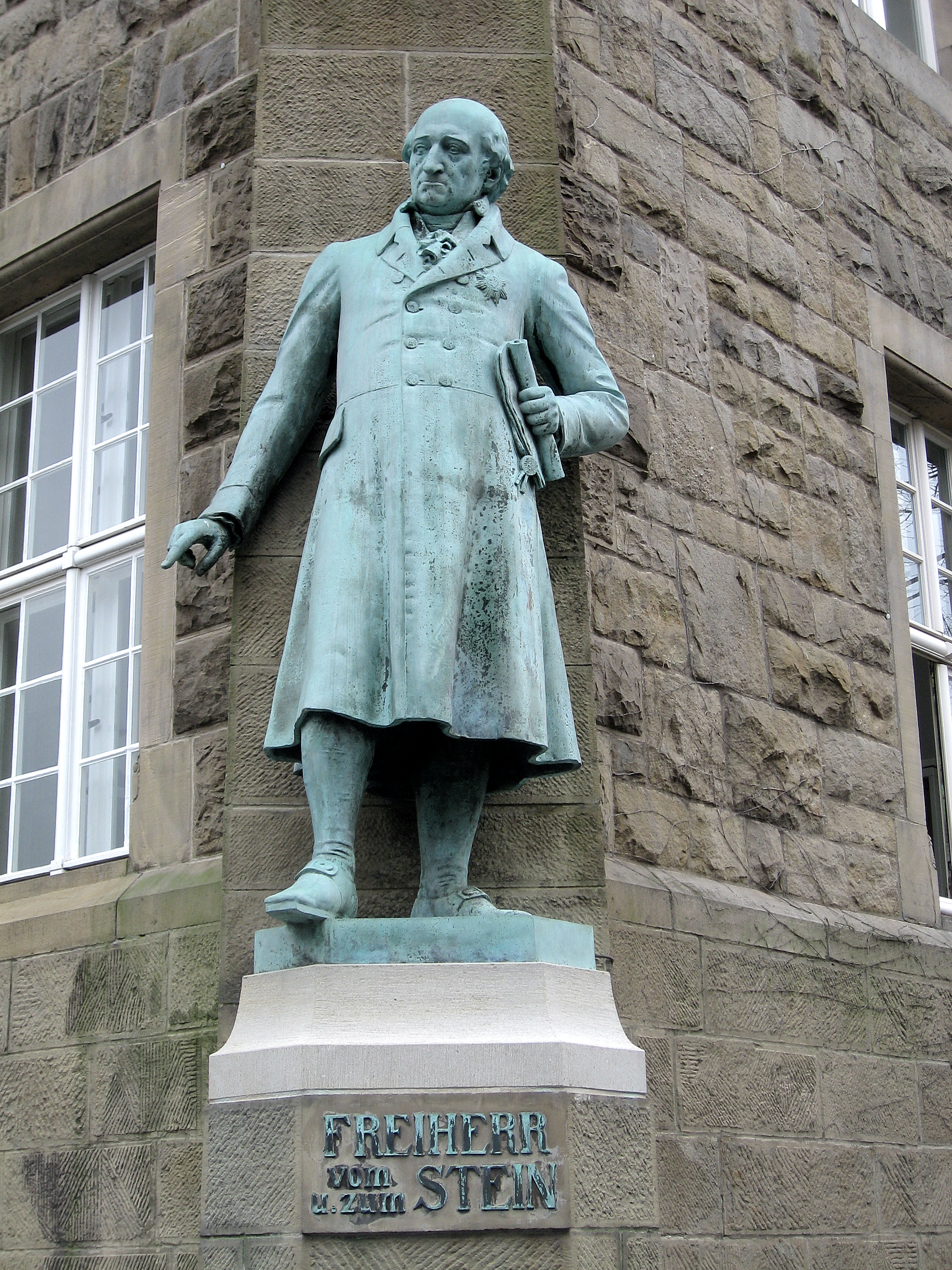 Statue von Freiherr vom Stein am Rathaus Wetter